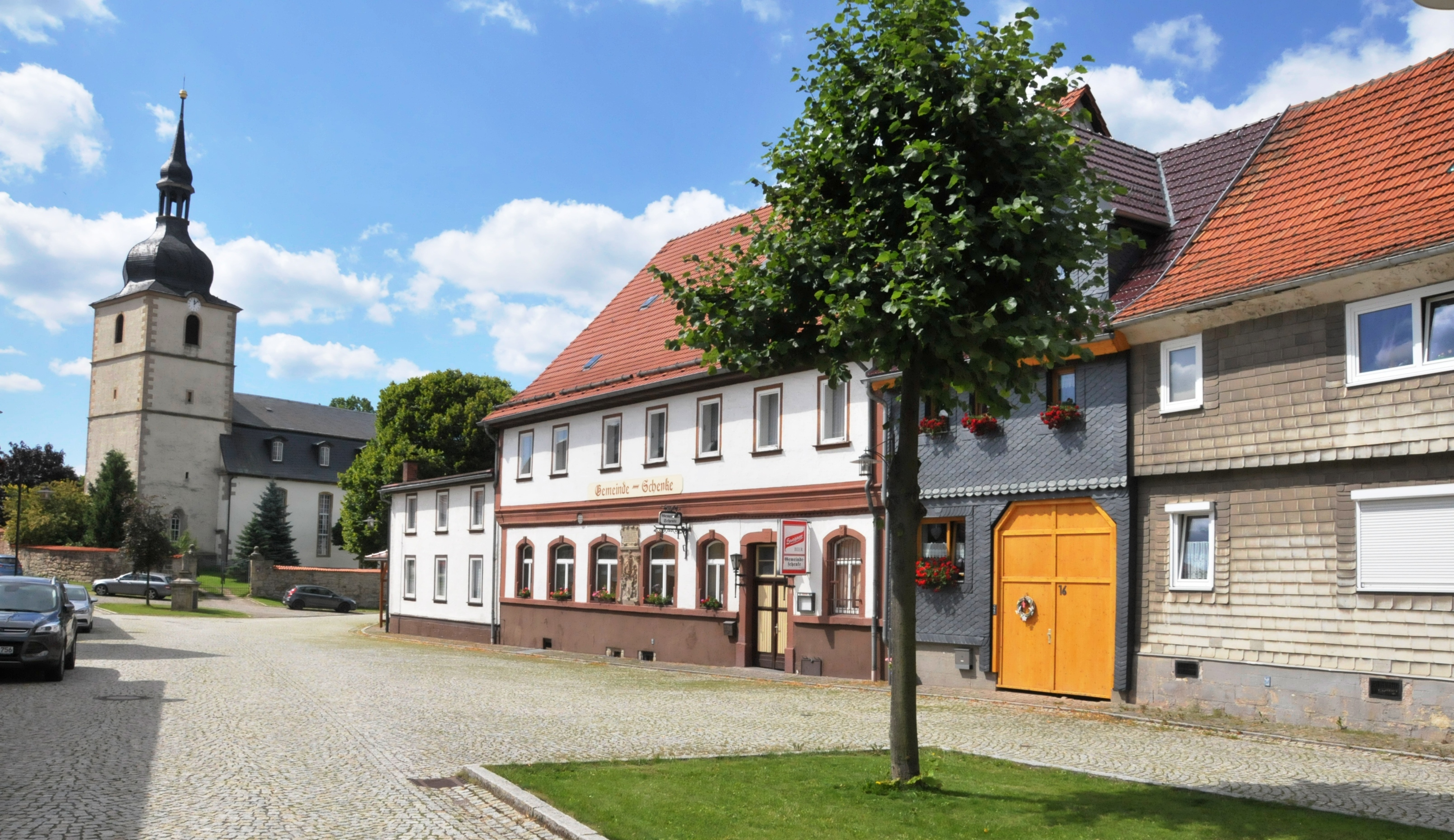 Crawinkel, Am Markt, Gemeindeschenke und KIrche